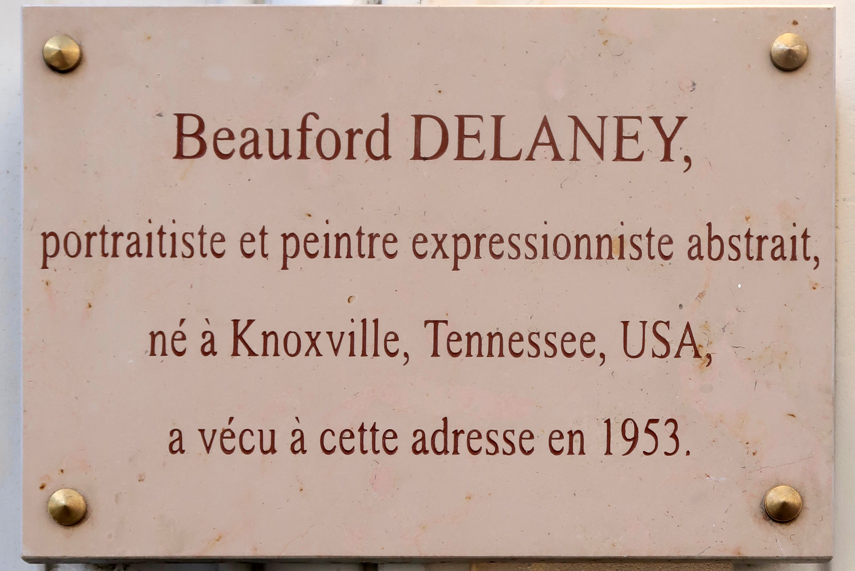 Plaque en hommage au peintre Beauford Delaney, 28 rue d'Odessa (Paris, 14e).